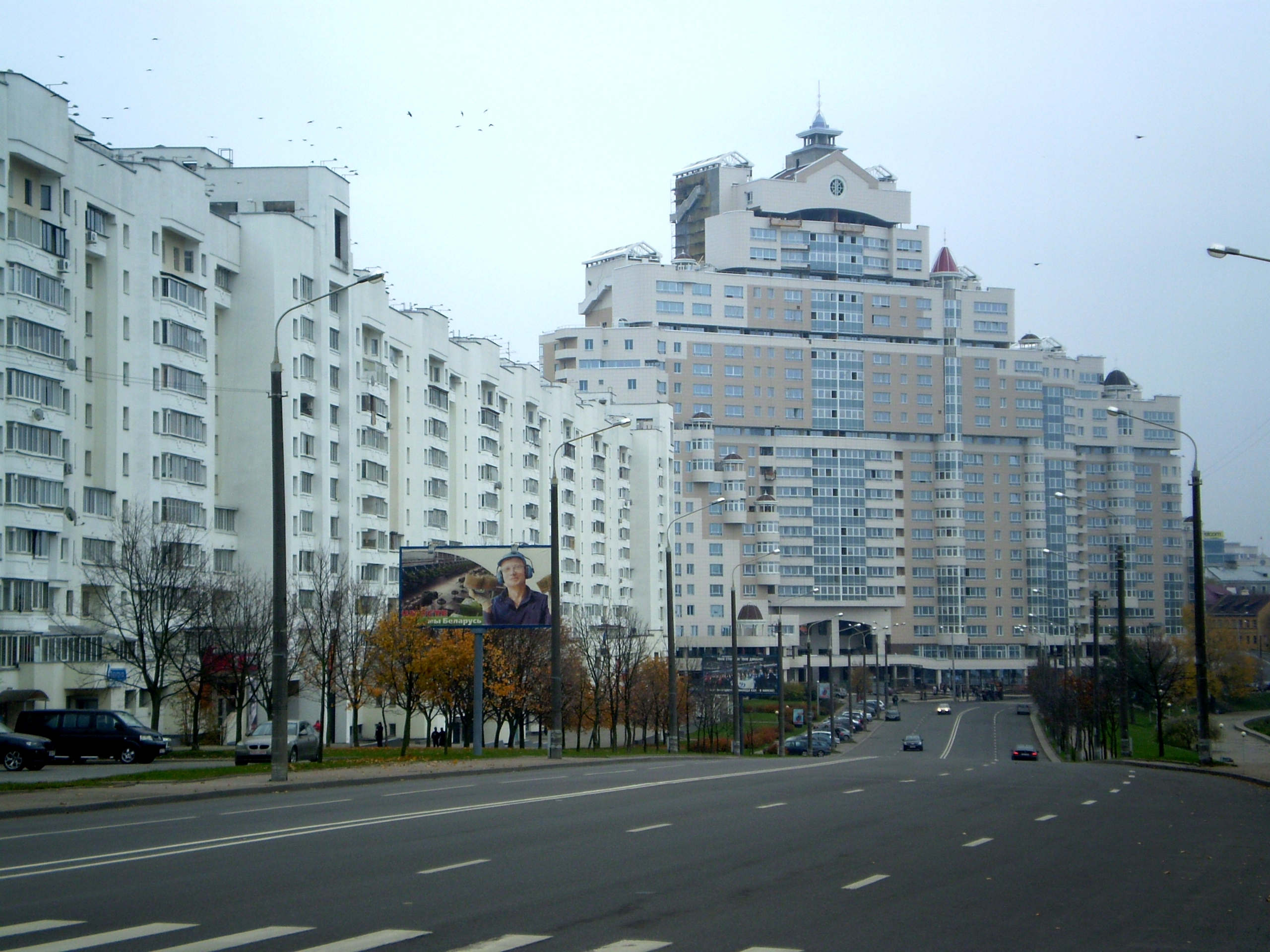 Вул. Старожаўская